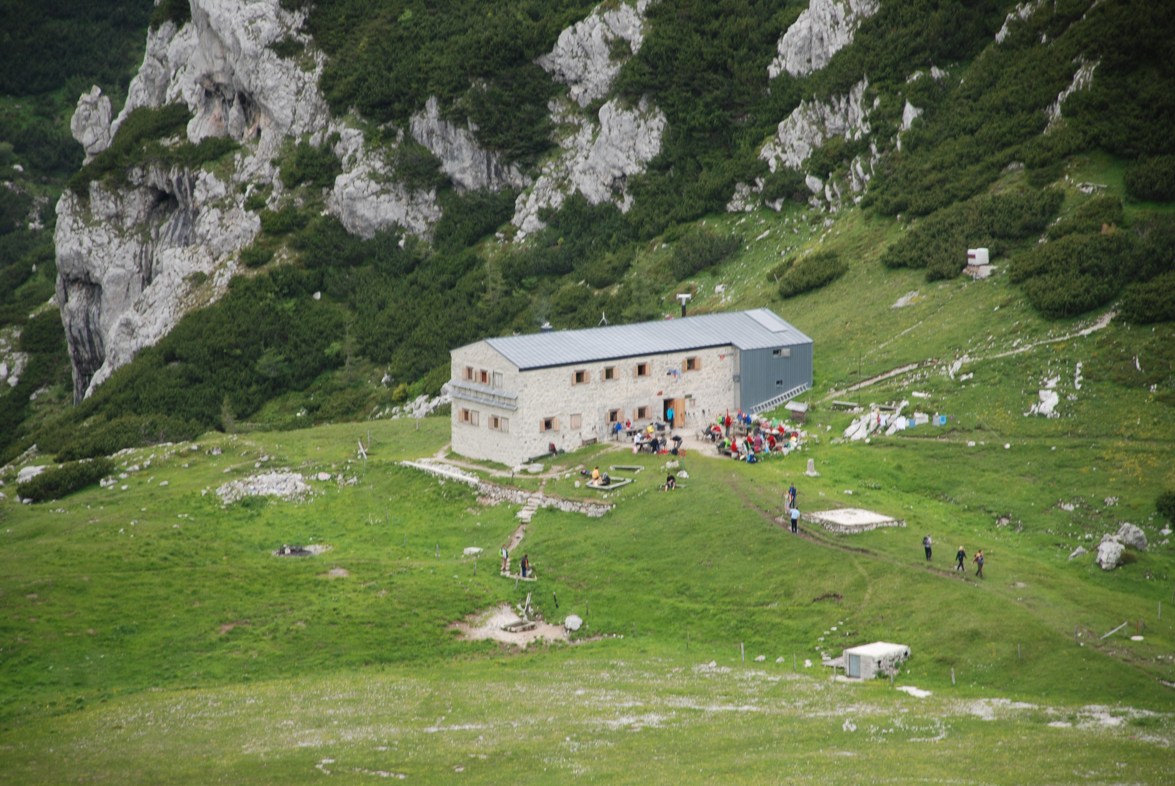 Planinski dom na Korošici pod Ojstrico v Kamniških Alpah